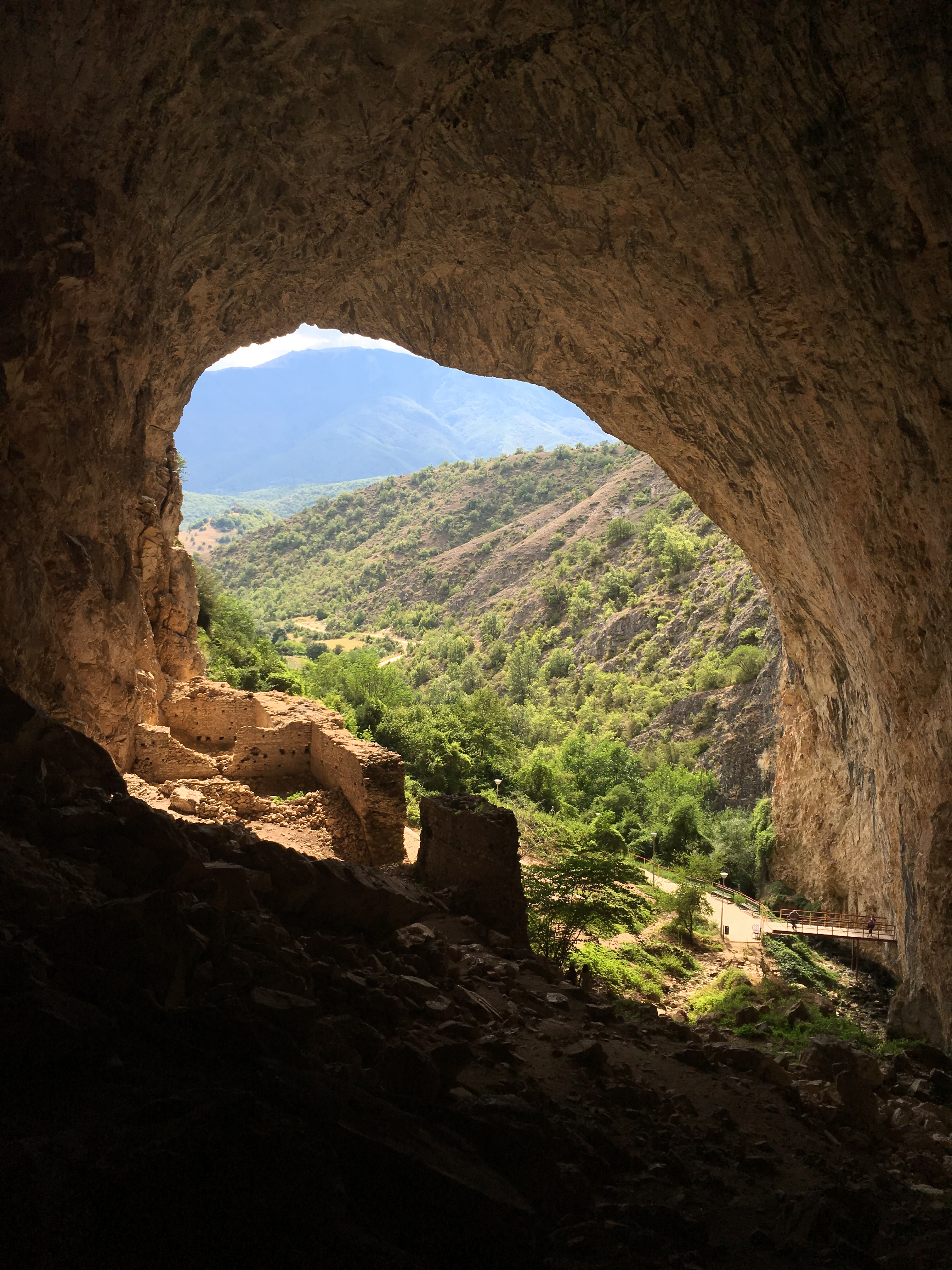 Пештерата Пешна